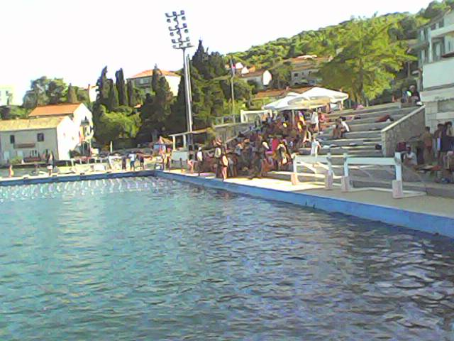 plivalište KPK